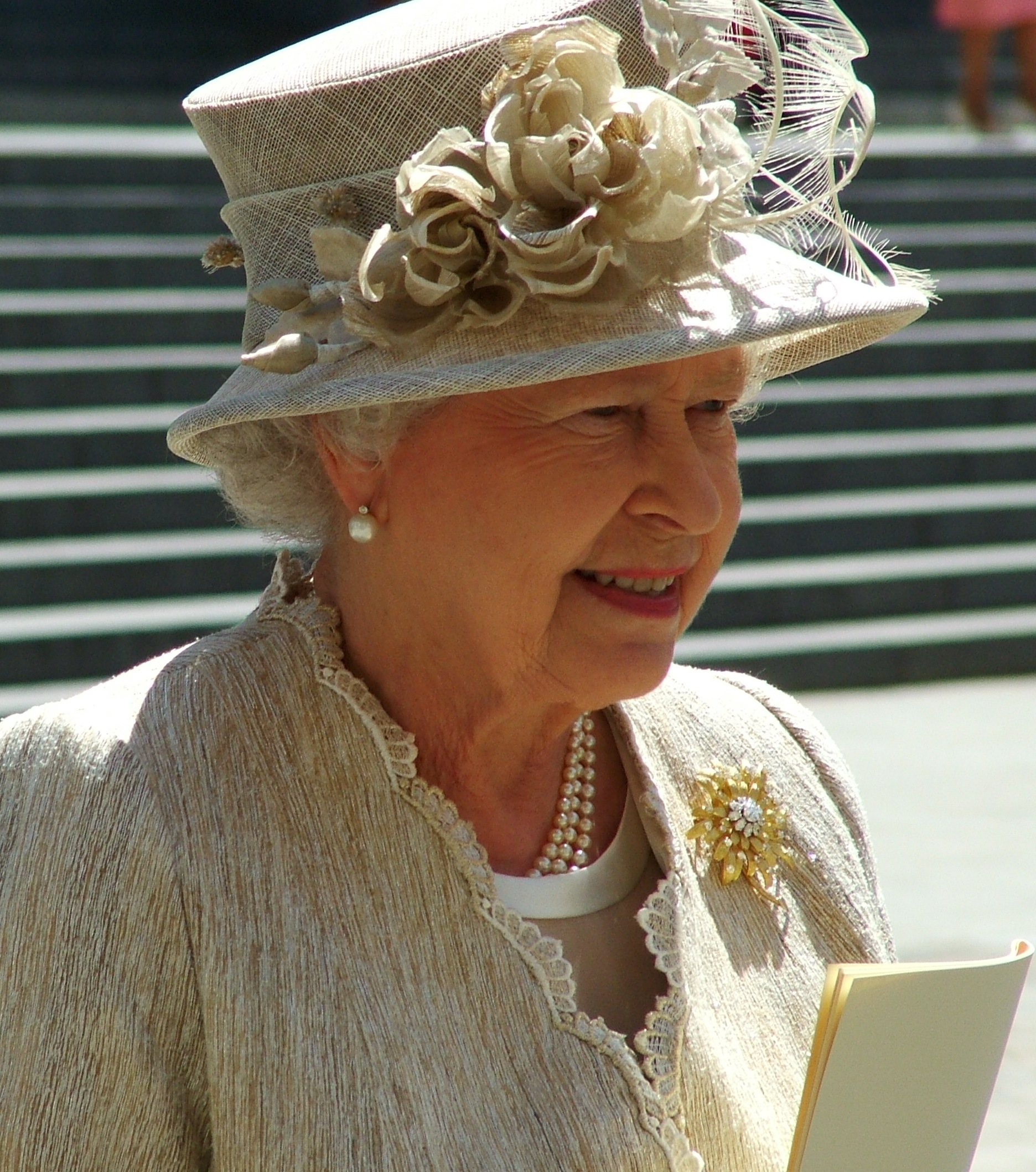 Rainha Isabel II durante as comemorações do seu aniversário de oitenta anos.